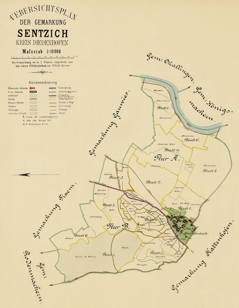 Uebersichtsplan der Gemarkung Sentzich, Kreis Diedenhofen.